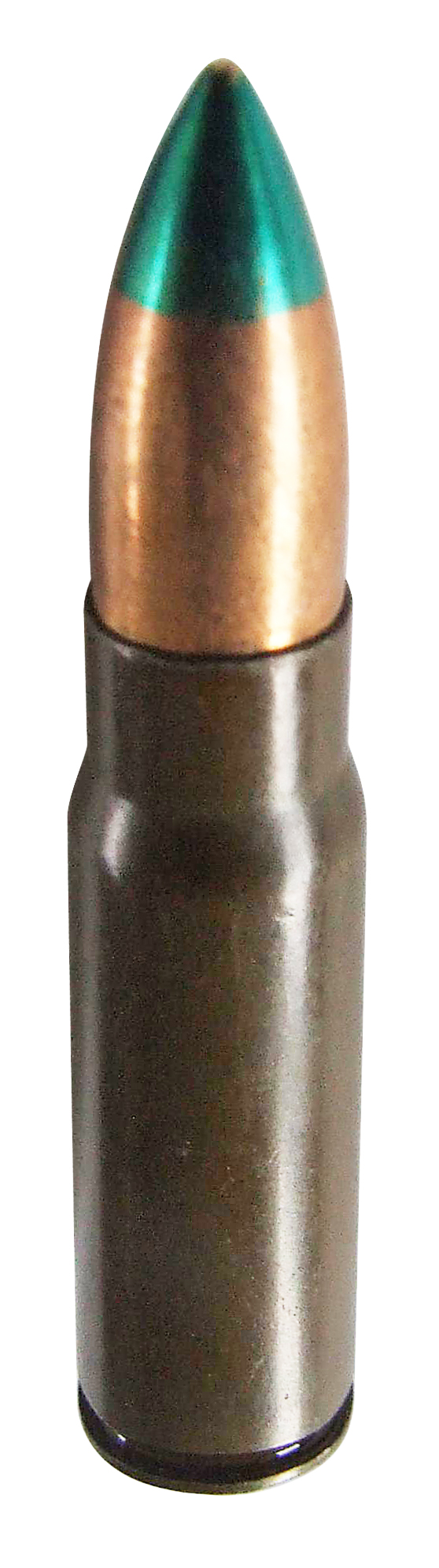 nabój 7,62 x 39 mm wz. 43